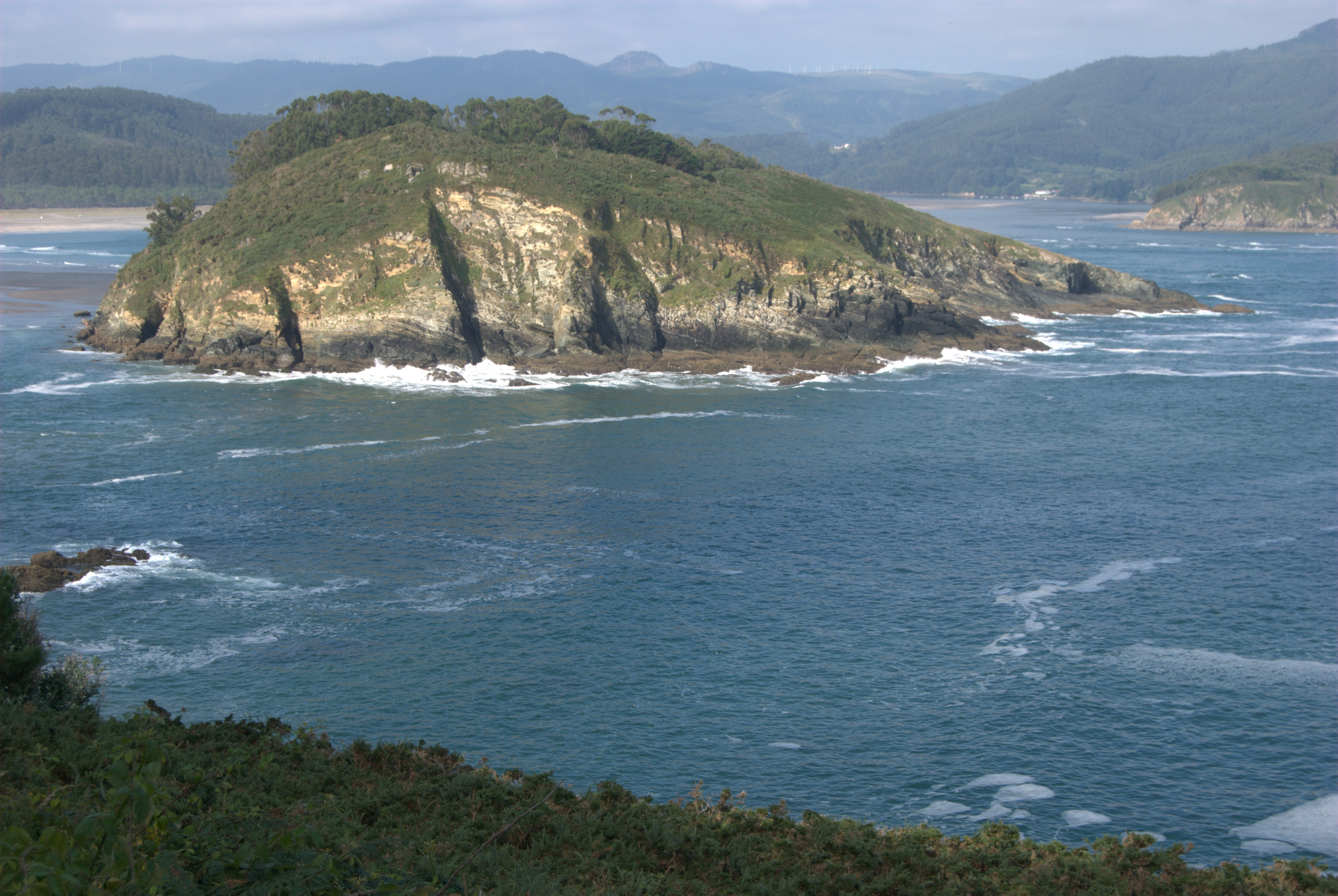 Illa de San Vicente, en Ortigueira